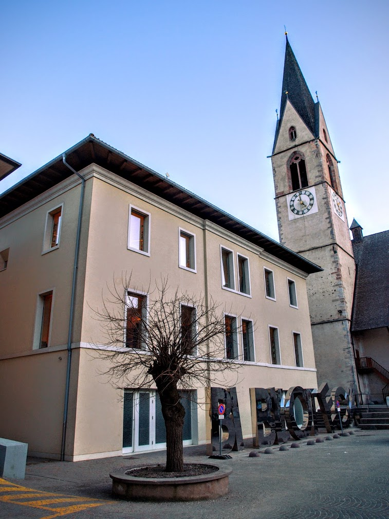 Castello di Cles